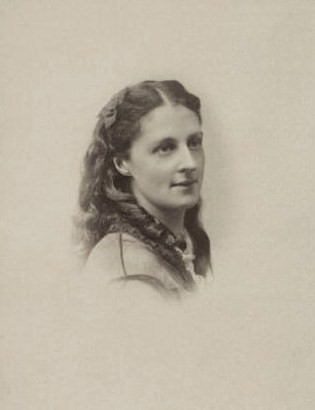 Графиня Мария Андреевна Шувалова (03.01.1856—1900), в замужестве Булычева.